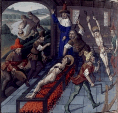 Vincent de Saragosse